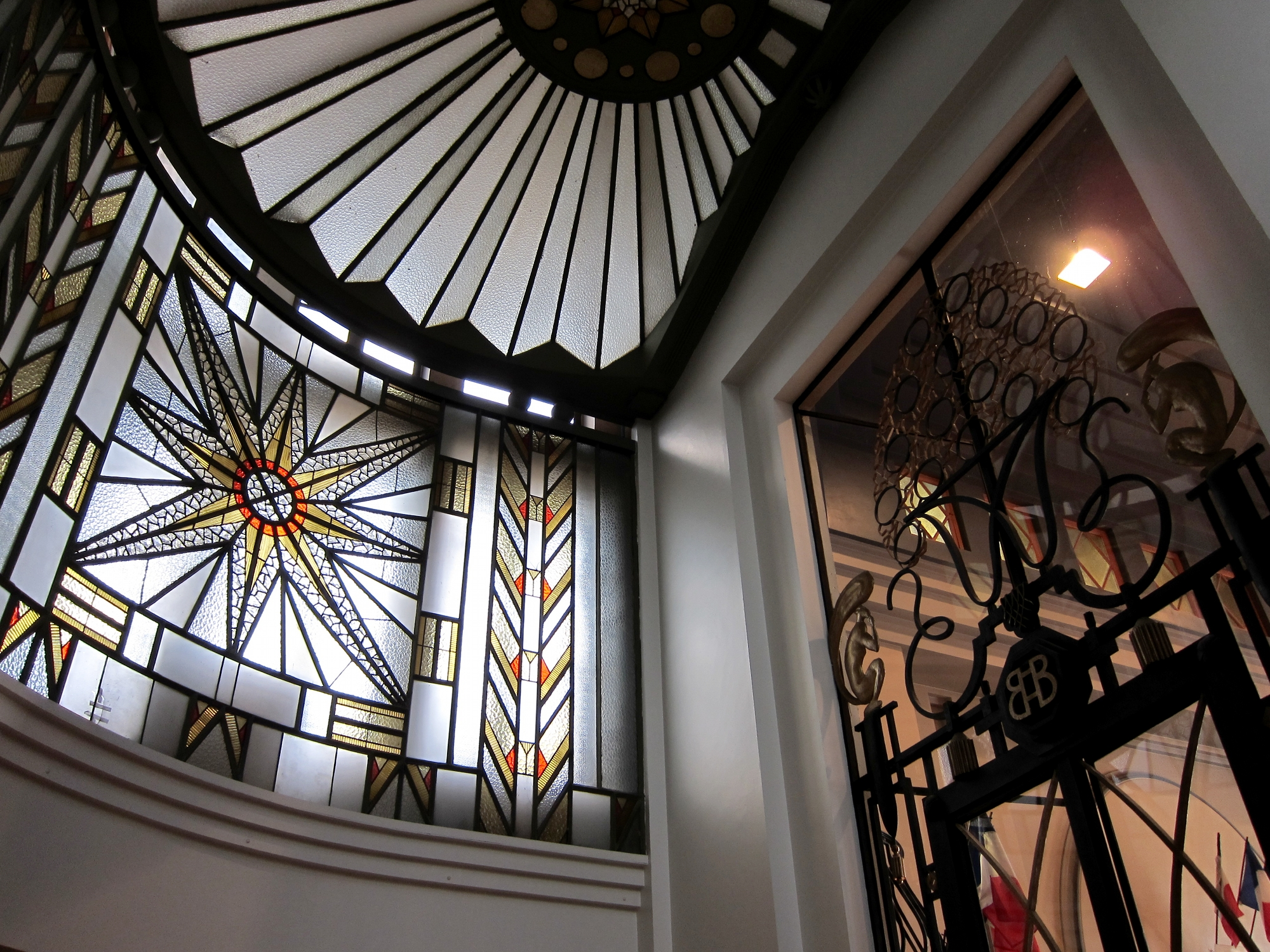 Verrière art déco de l'hôtel de ville de Béthune (Pas-de-Calais).